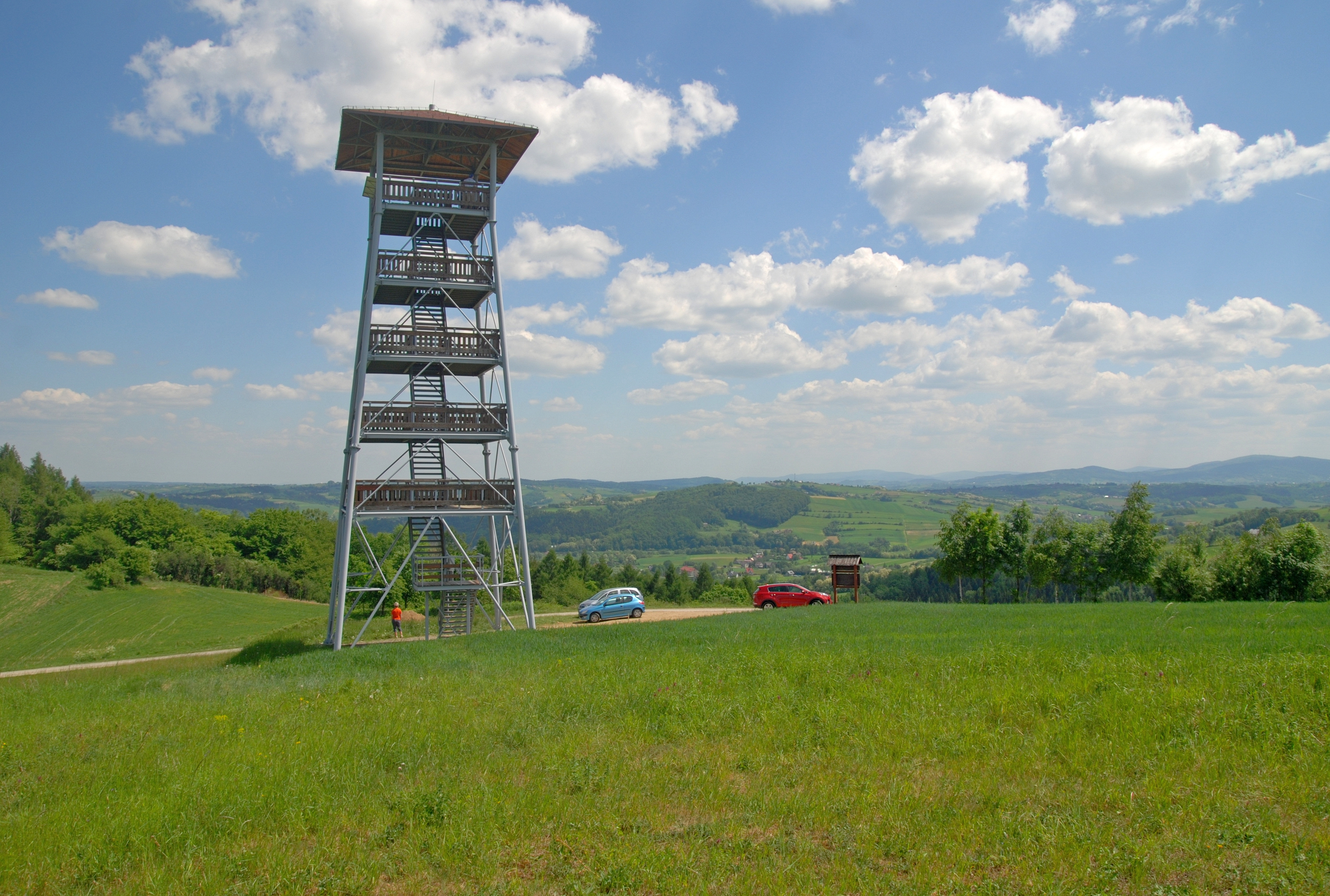 wieś Bruśnik